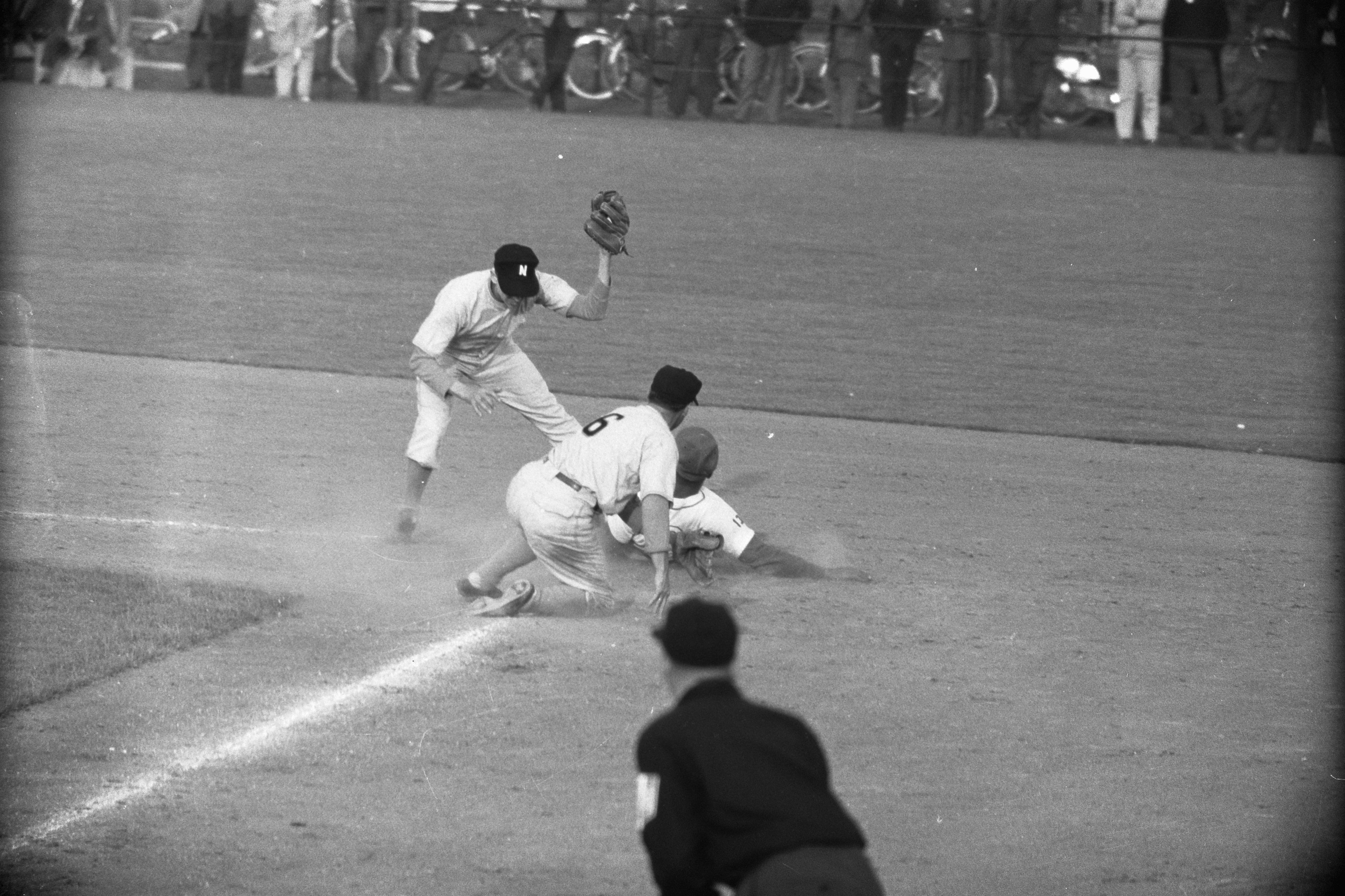 Collectie / Archief : Fotocollectie Anefo Reportage / Serie : [ onbekend ] Beschrijving : Honkbalweek in Haarlem. Tweede honk Datum : 25 juli 1961 Locatie : Haarlem Trefwoorden : honkbal Fotograaf : Pot, Harry / Anefo, [onbekend] Auteursrechthebbende : Nationaal Archief Materiaalsoort : Negatief (zwart/wit) Nummer archiefinventaris : bekijk toegang 2.24.01.05 Bestanddeelnummer : 912-7672